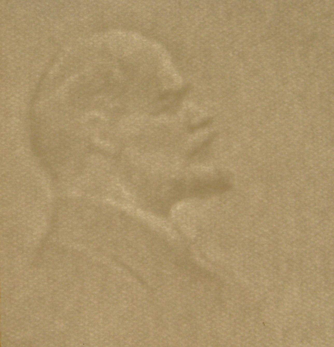 Водяной знак с изображением Ленина с банкноты 100 рублей СССР 1961 года.